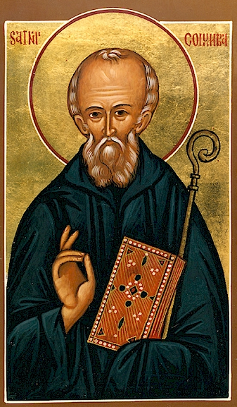 Икона святого Коламбы Айонского, 1990-2005